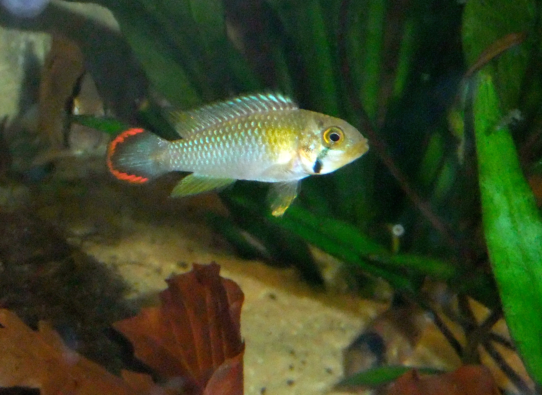 Apistogramma panduro männlich